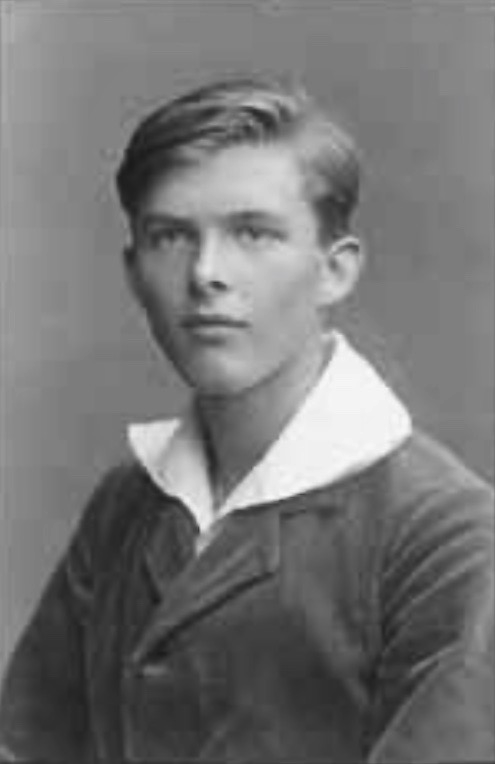 Erich Krems (1898–1916) als Schüler der Freien Schulgemeinde Wickersdorf in Saalfeld/Saale im Thüringer Wald und Wandervogel